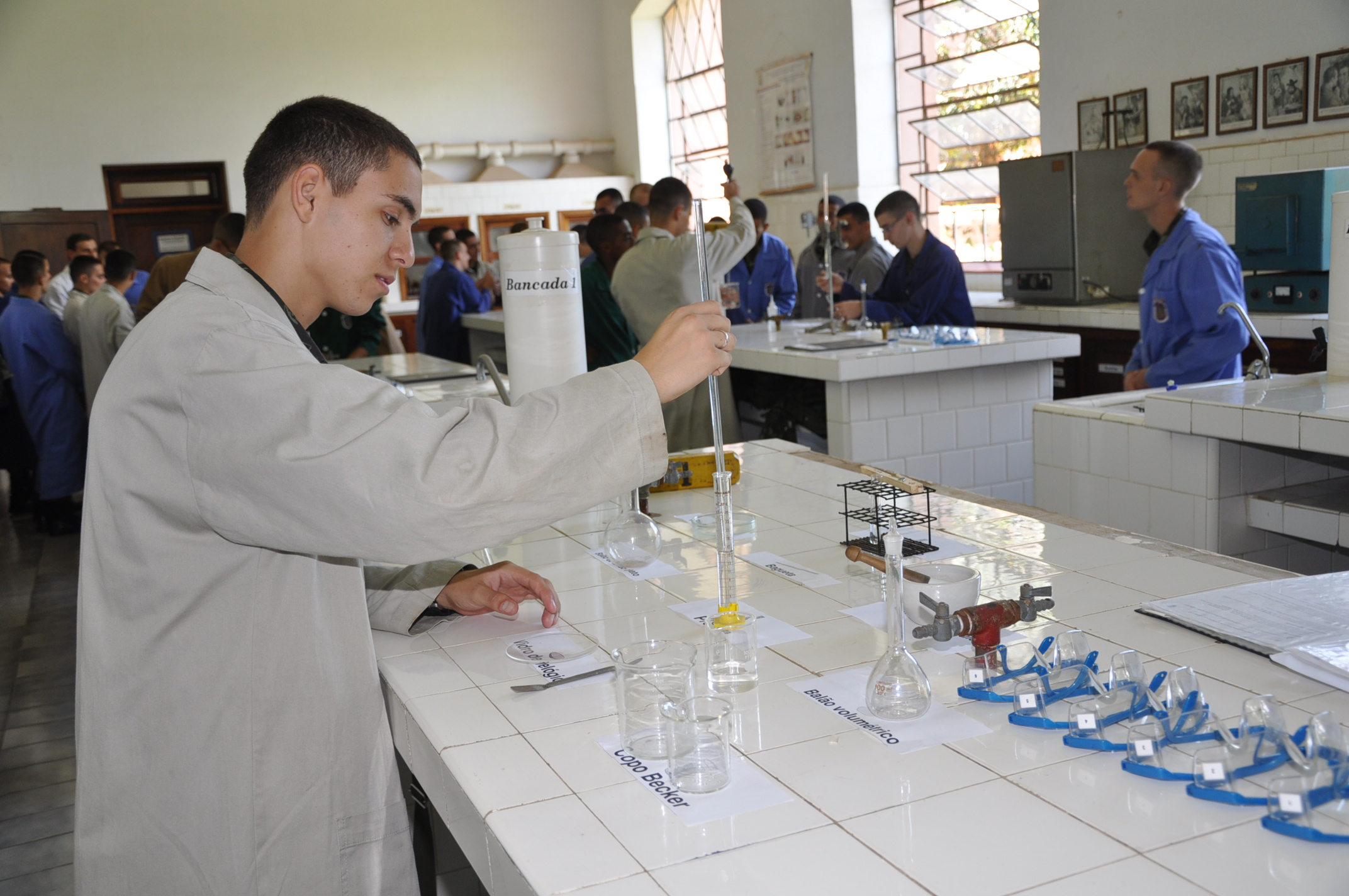 Laboratório de Química